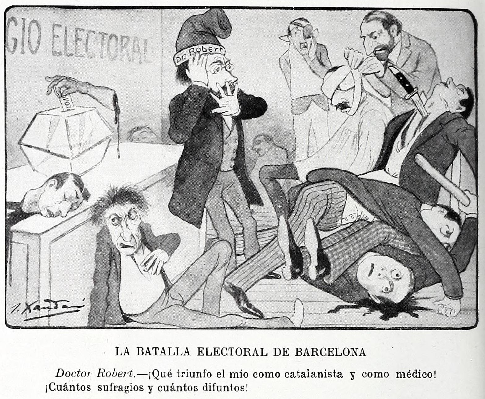 LA BATALLA ELECTORAL DE BARCELONADoctor Robert.—¡Qué triunfo el mío como catalanista y como médico!¡Cuántos sufragios y cuántos difuntos!